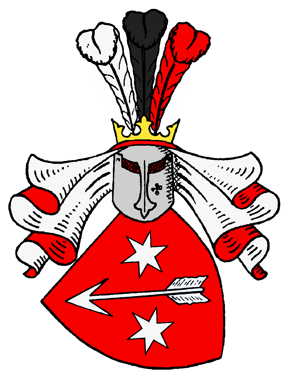 Wappen derer von Promnitz